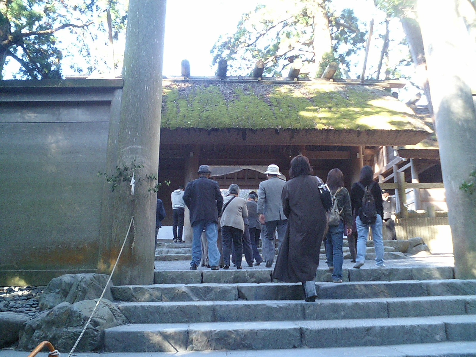 伊勢神宮内宮･遙拝所近影。平成17年(2005年)11月16日に参詣。